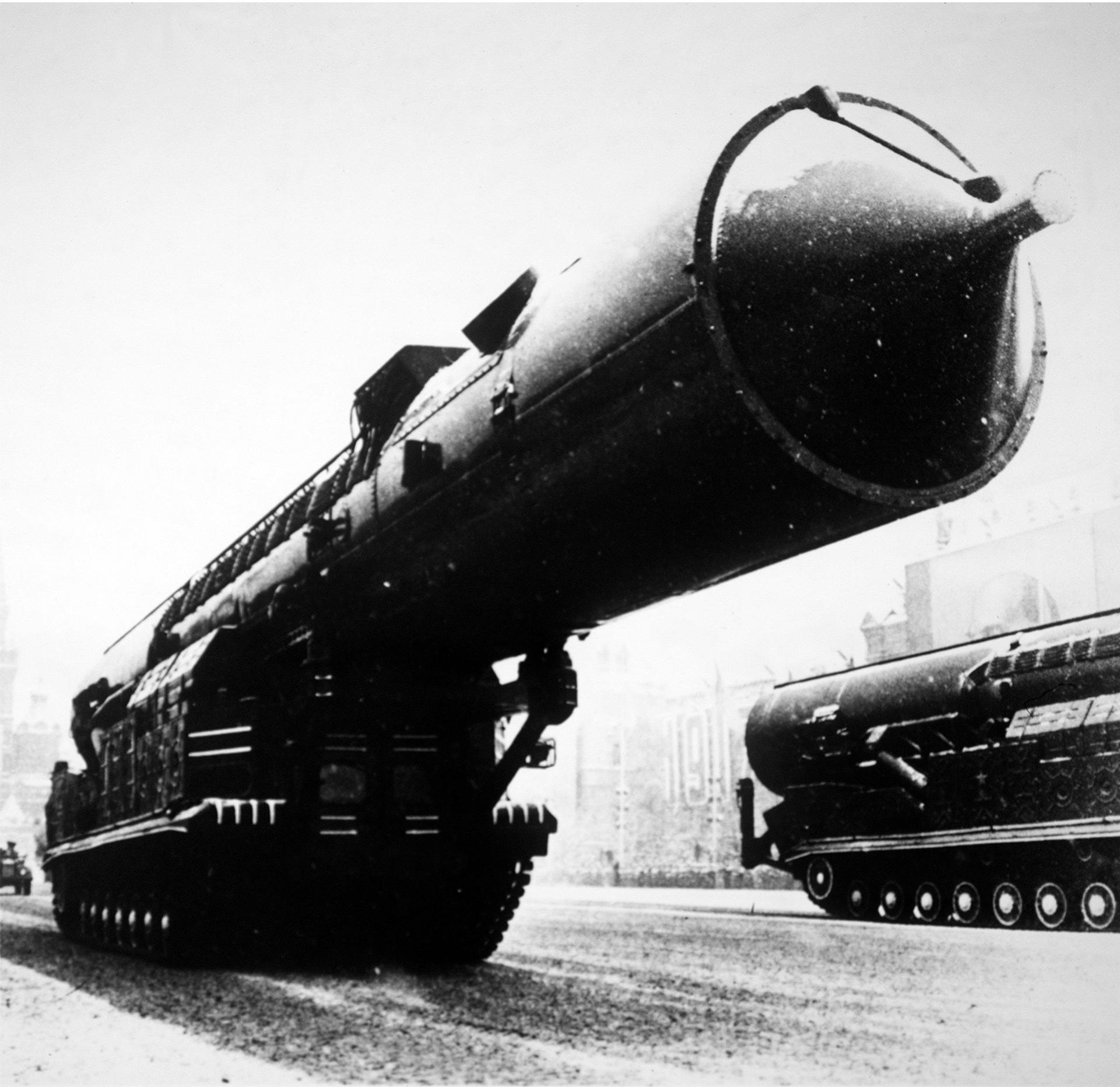 SS-X-15 Mobile Shorter-Ranger ICBM.